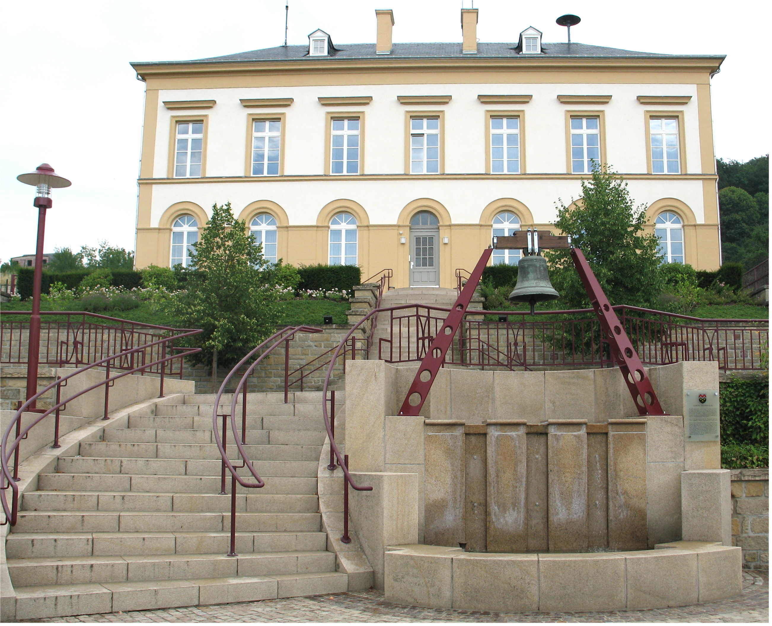 Miedernach, d'fréiert Schoulgebai.